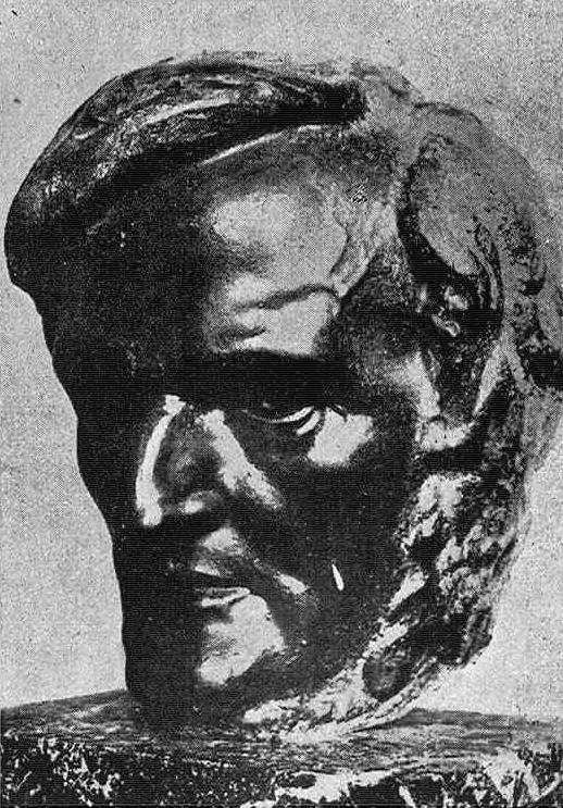 Wagner.